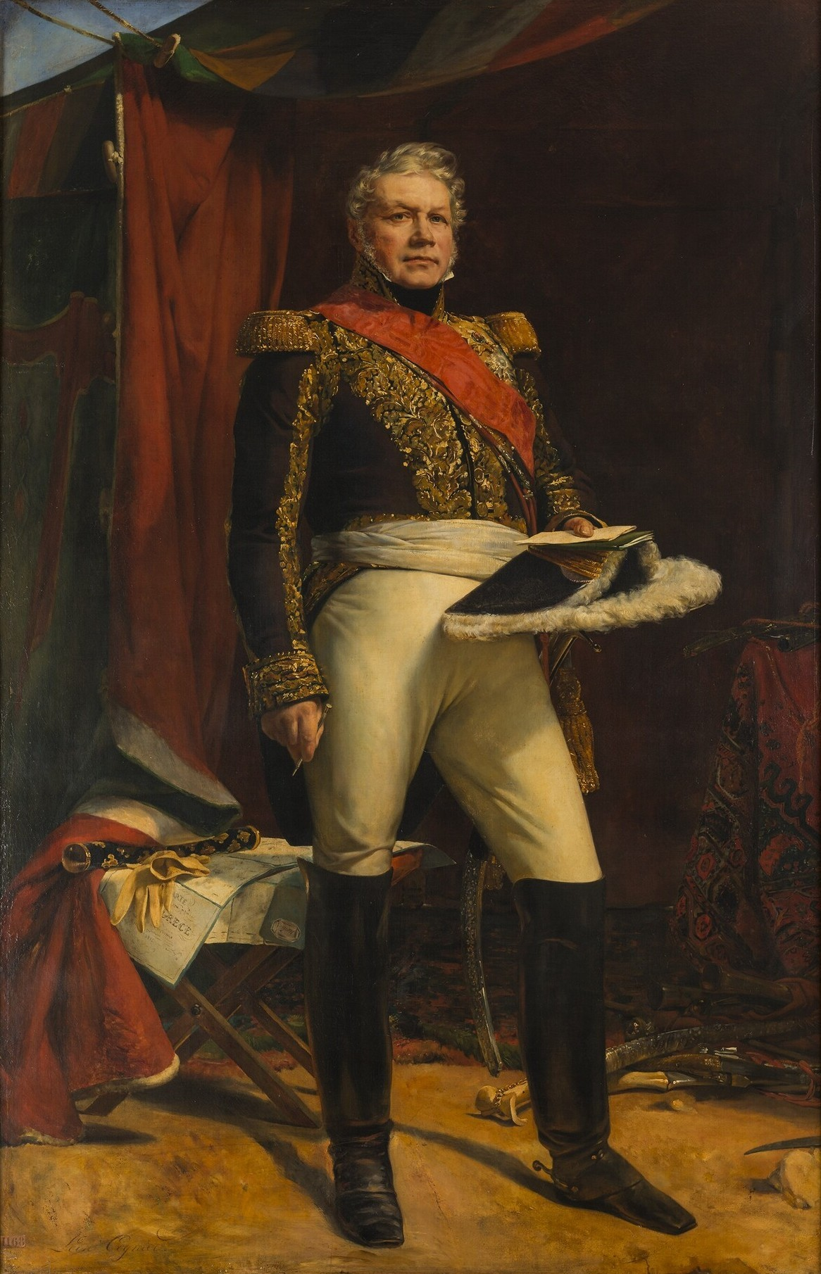 Dessin d'après un original et étude préparatoire au musée d'Orléans ; commandé par Louis-Philippe pour le musée historique de Versailles en 1835.